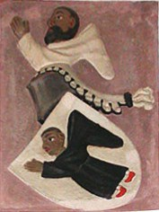 Wappen der Münch von Landskron am Grabmal des Probstes Konrad Münch von Landskron (+ 1371) in der Peterskirche Basel